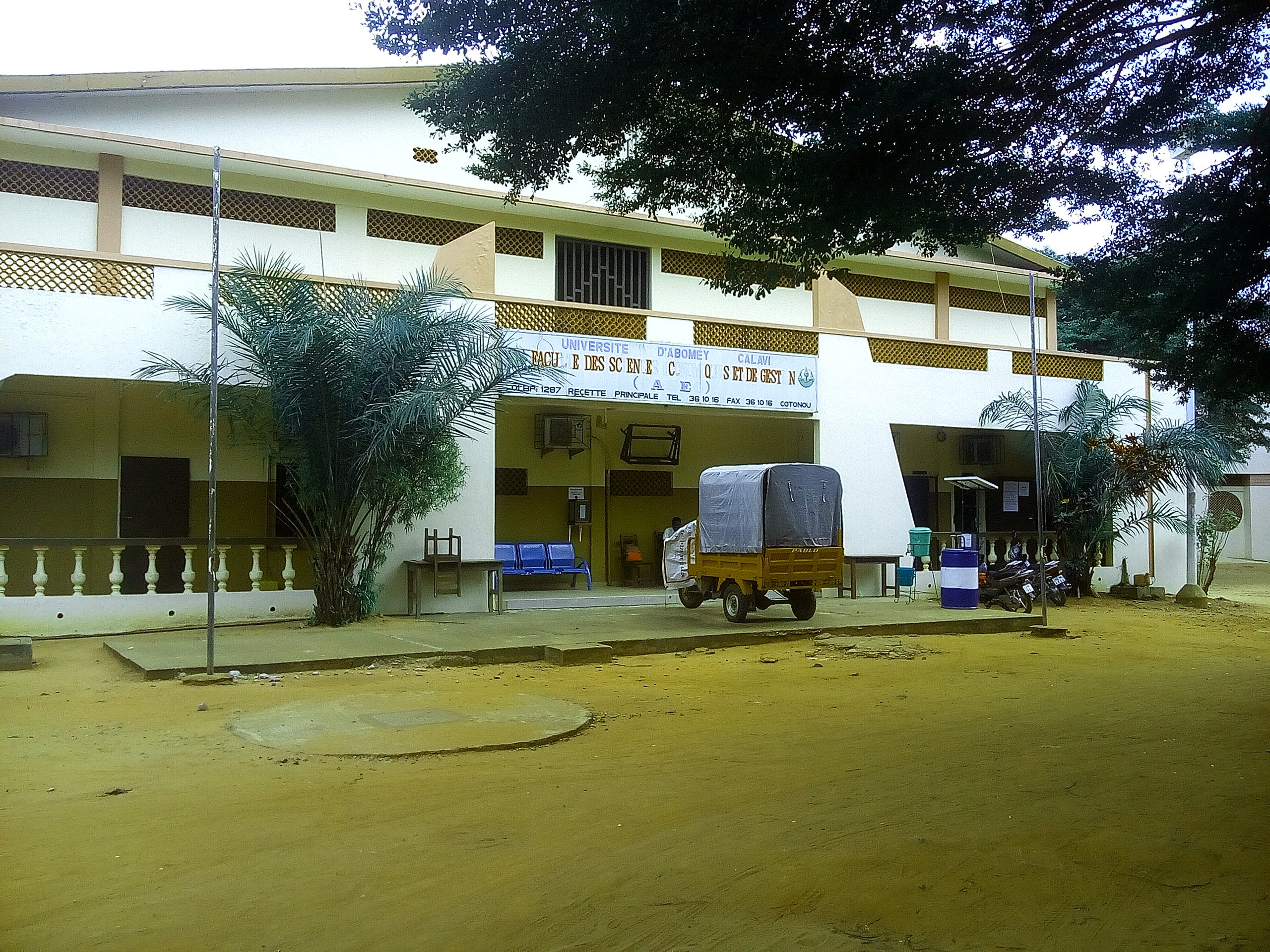 faseg